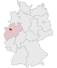 Kreis Recklinghausen, North Rhine-Westphalia, Germany